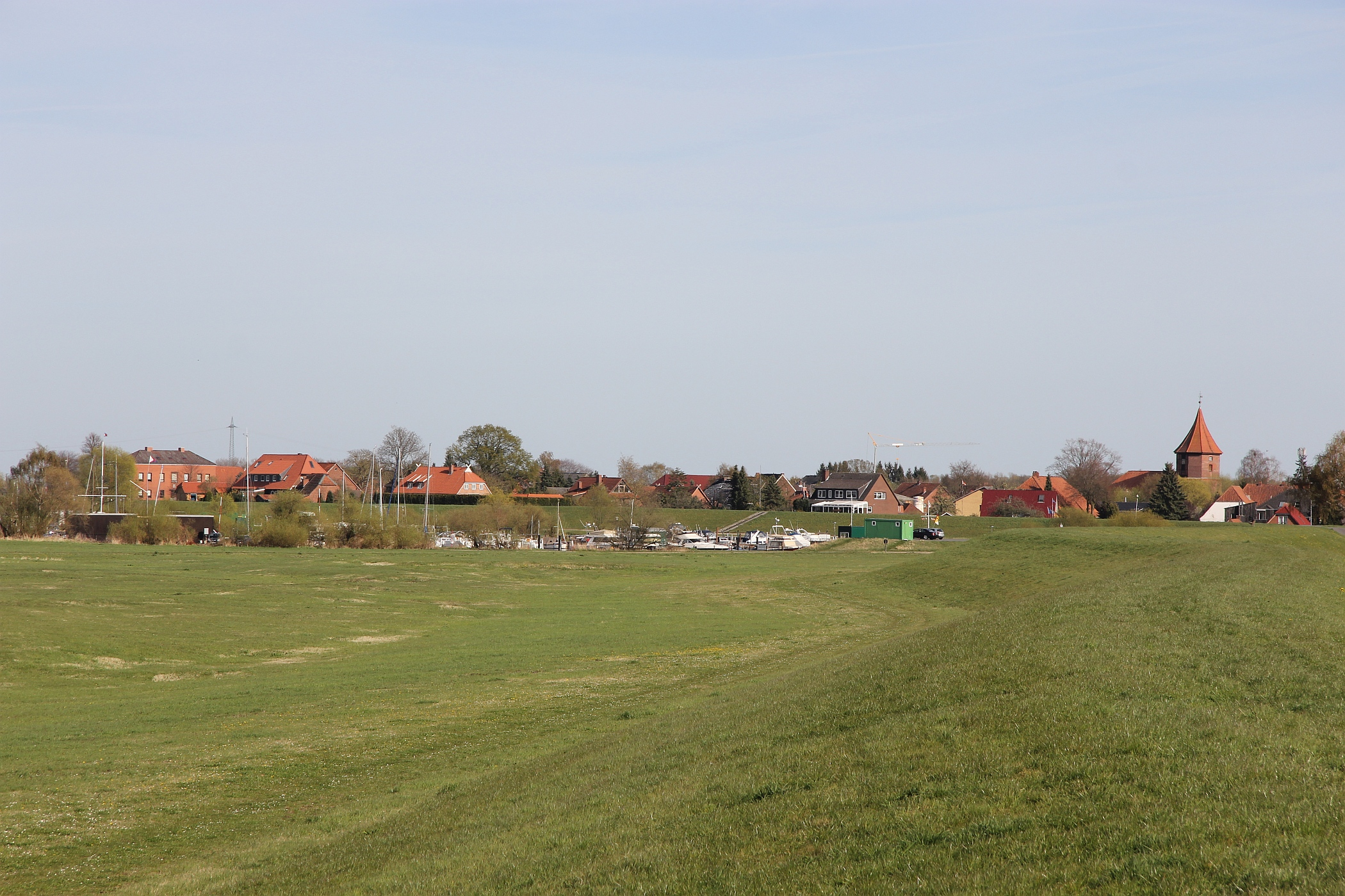 Artlenburg